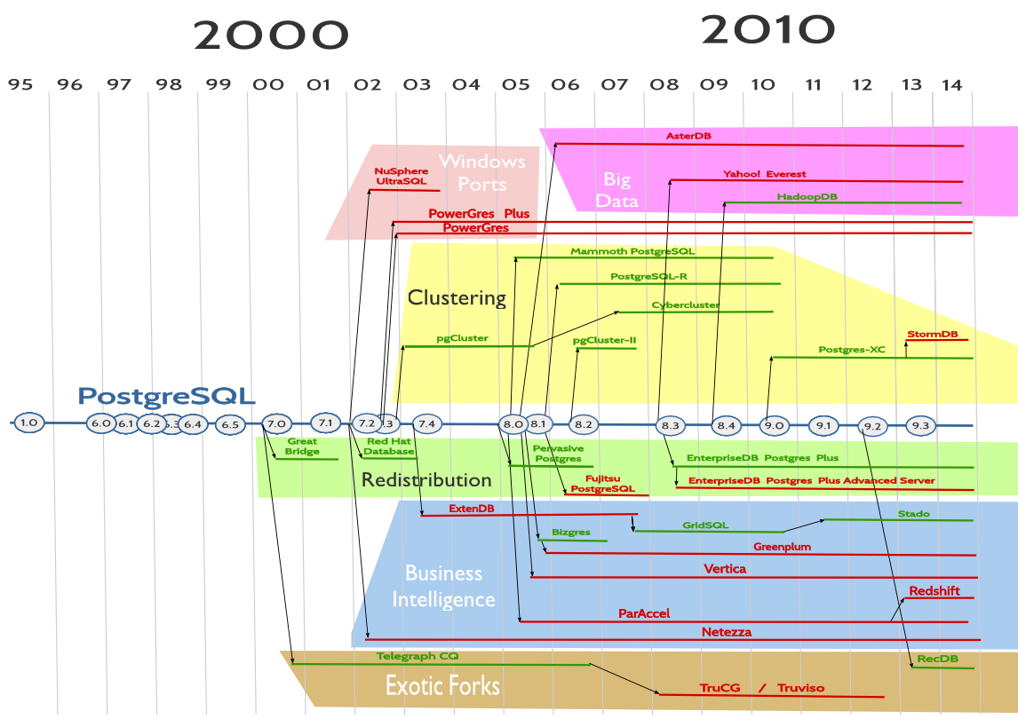 PostgreSQL timeline